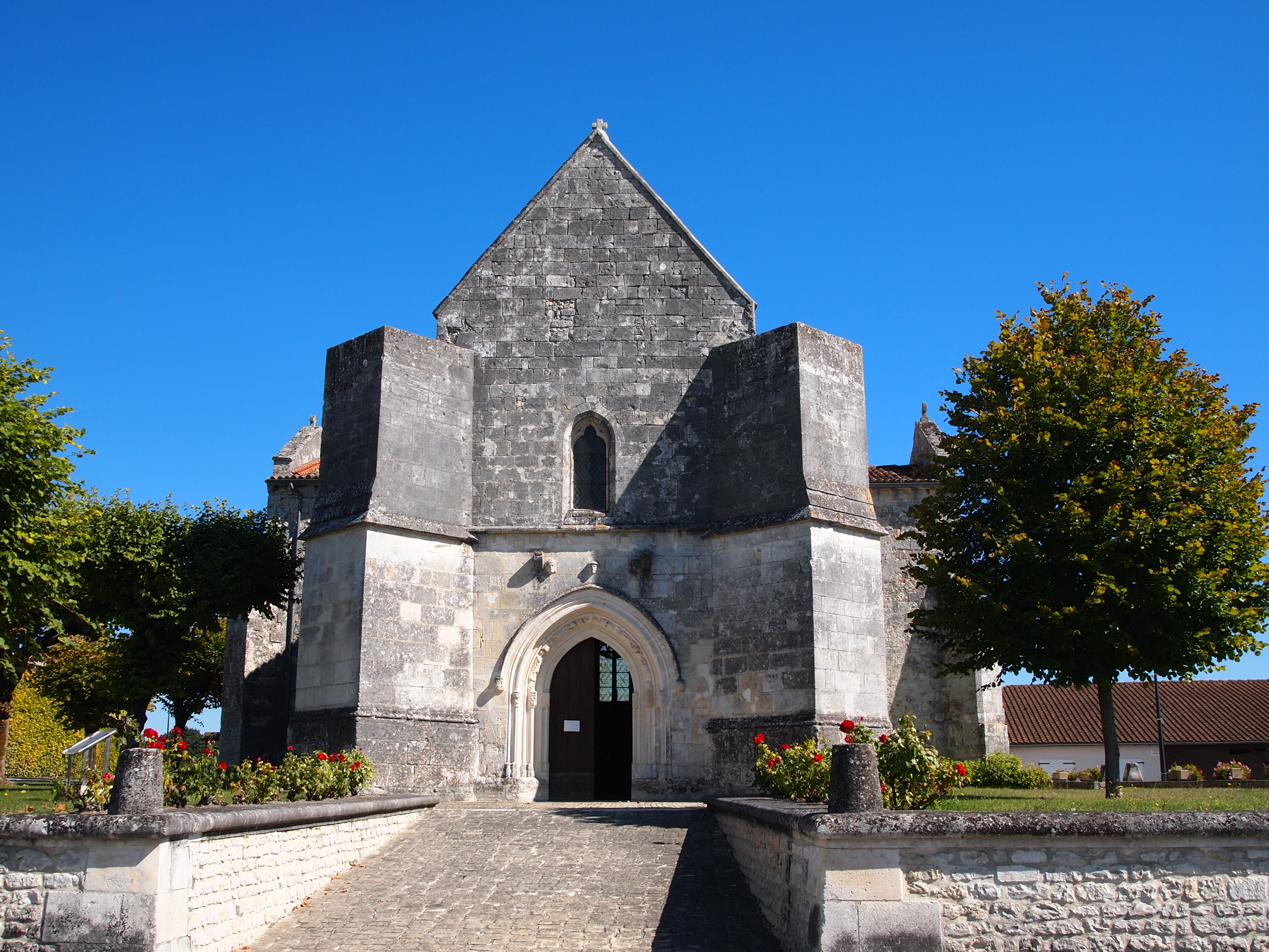 église de Germignac, en Charente-Maritime (France).